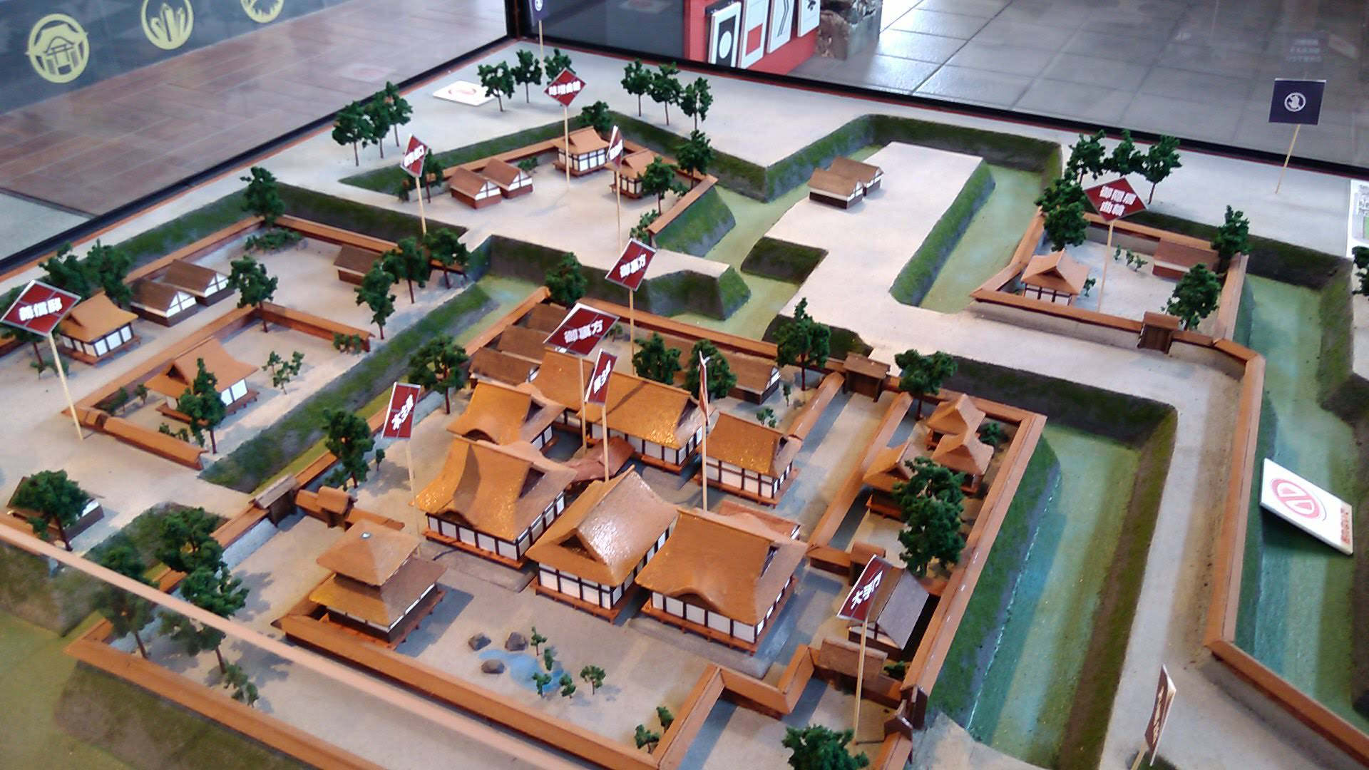 躑躅ヶ崎館 - ジオラマ（こうふ開府500年メモリアルギャラリー展示物・甲府駅）